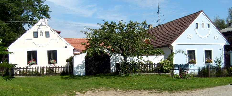 Ukázka selského baroka v Kojákovicích.